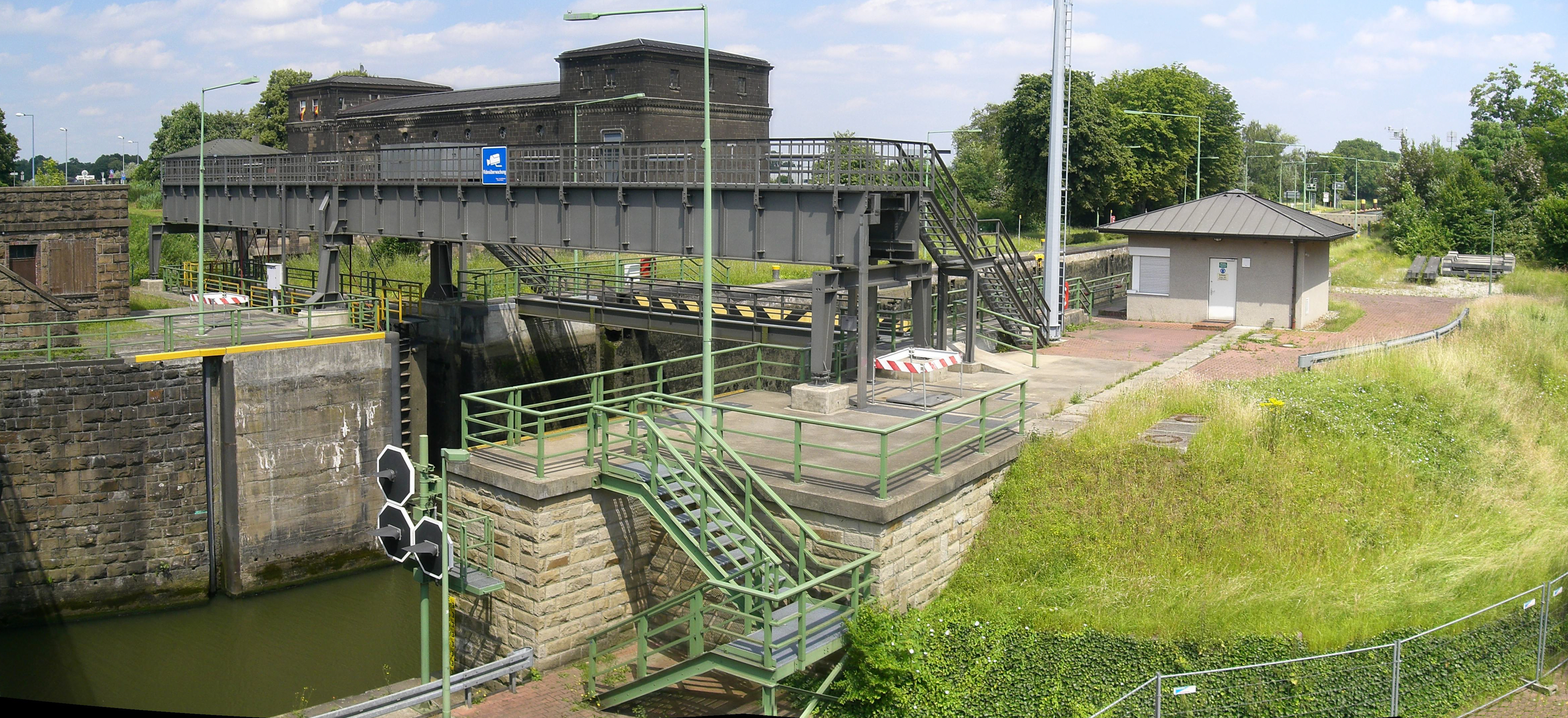 Ruhrschleuse Raffelberg in Mülheim